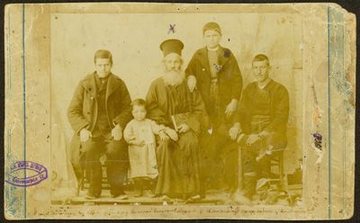 Стоян Гайгуров в Мелник, 1900